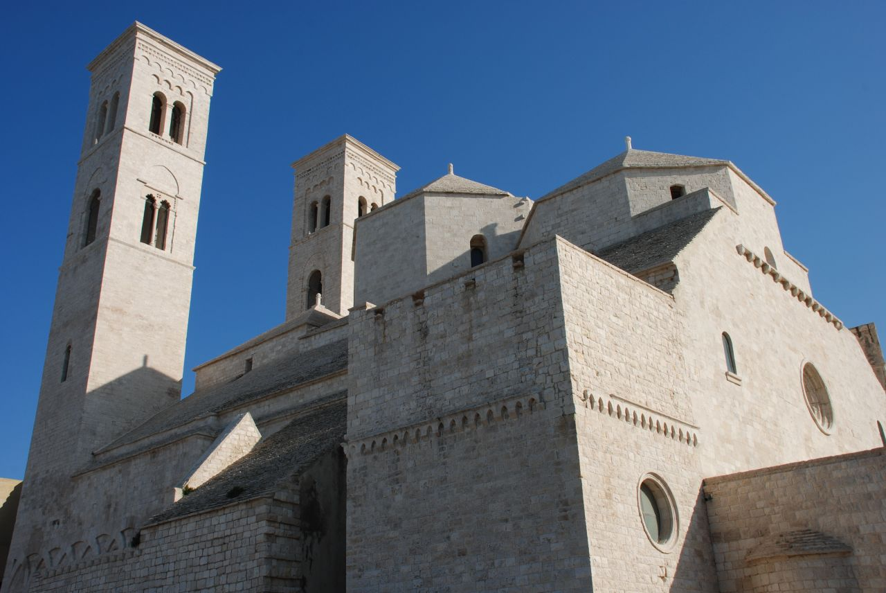 Cattedrale di Molfetta